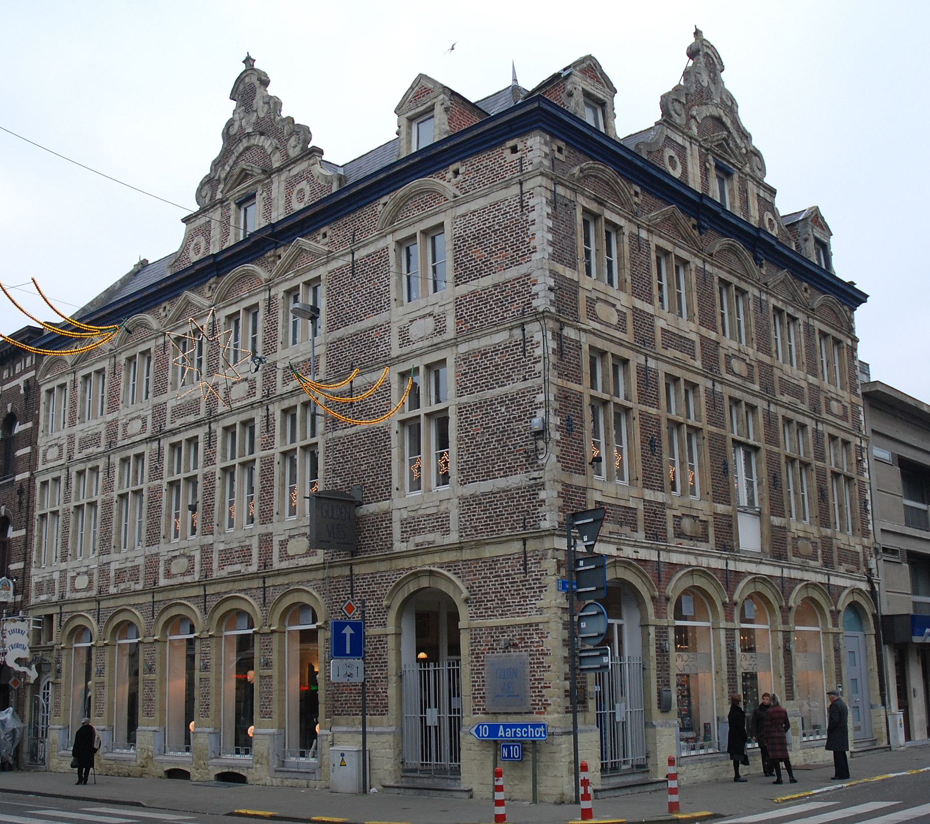 Het Gulden Vlies, renaissance-residentie van de aartshertogen Albrecht van Oostenrijk en Isabella van Spanje tijdens hun bezoeken aan Scherpenheuvel, België